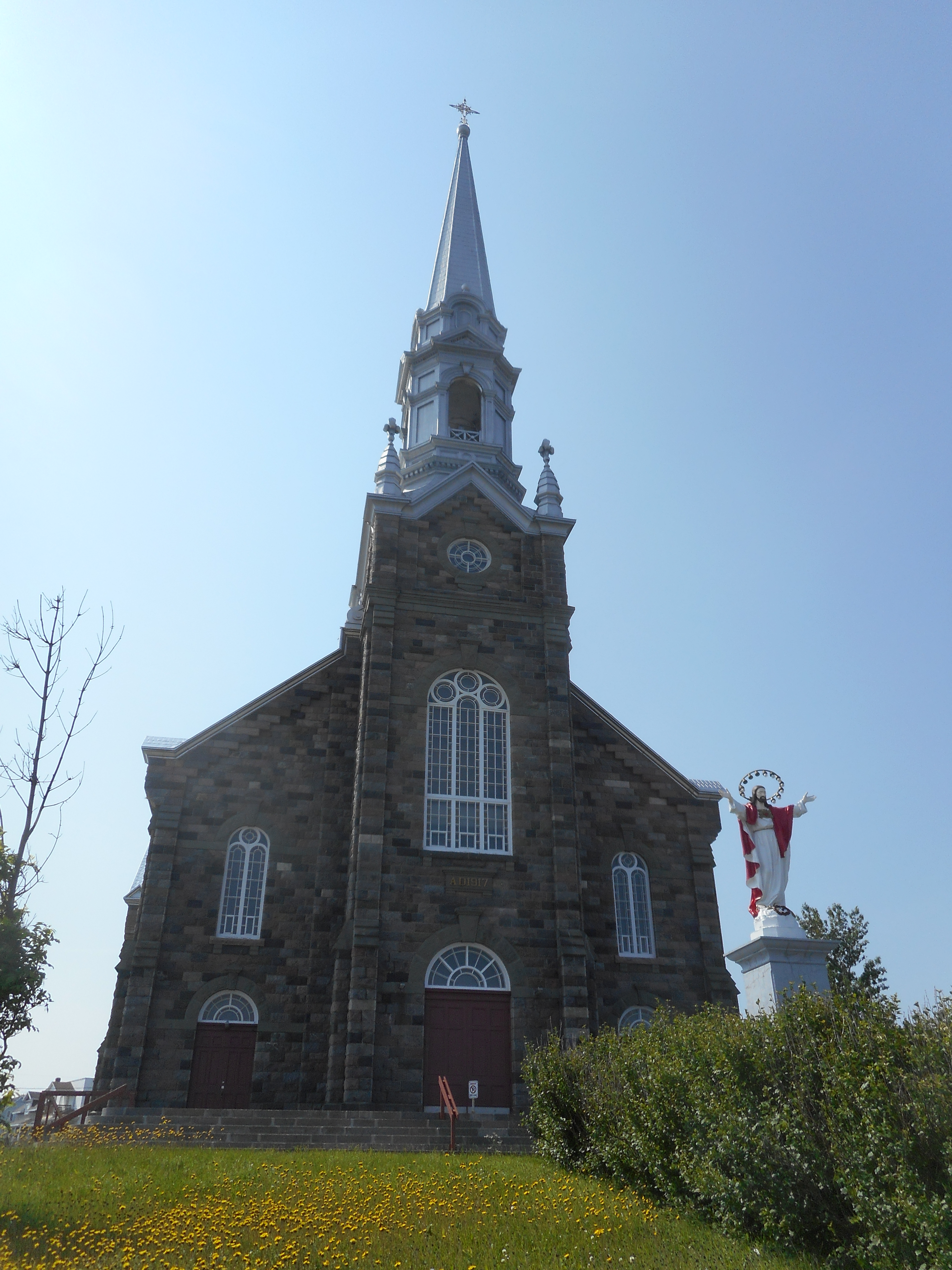 Église de Cap-Chat, rue Notre-Dame, Cap-Chat